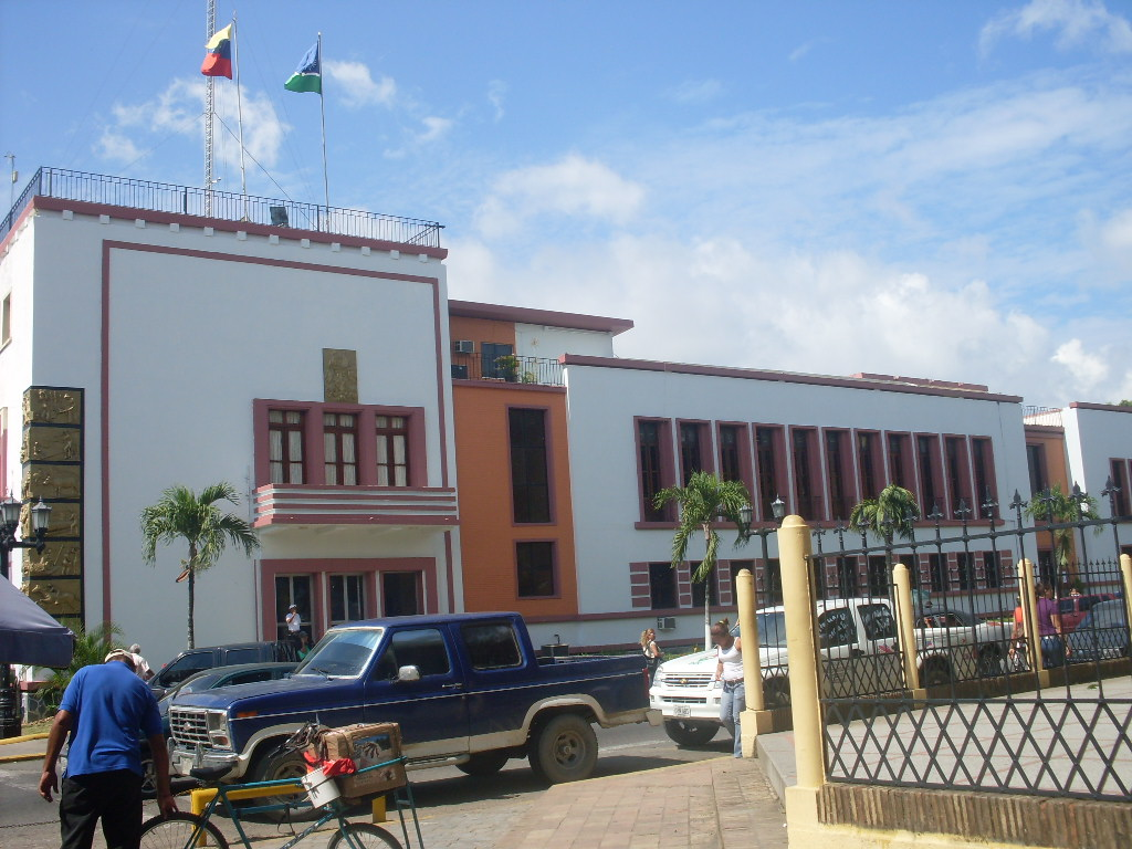 Guanare en el estado Portuguesa - Venezuela (2010)